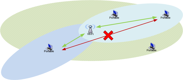 Schéma descriptif de la raison d'exister de la méthode CSMA-CA